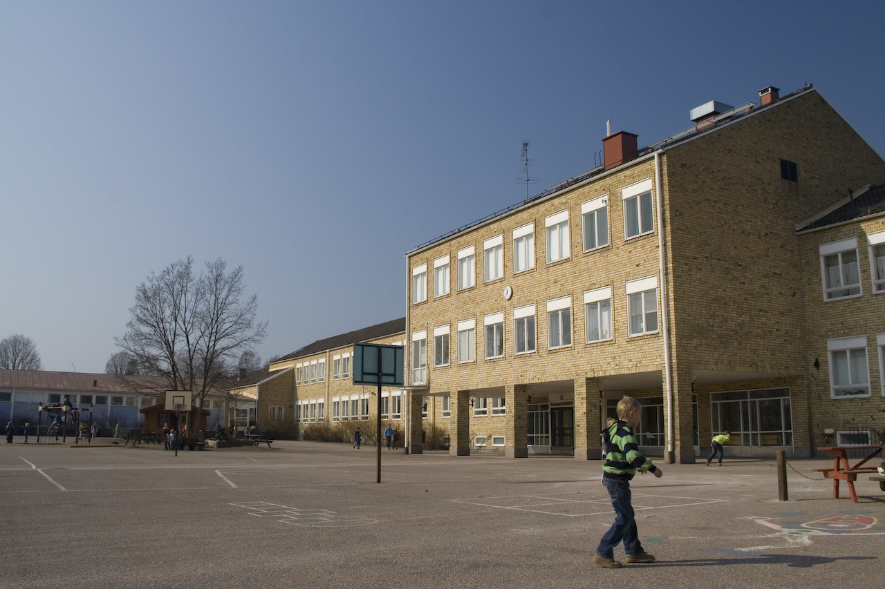 Del av Breviksskolans skolgård